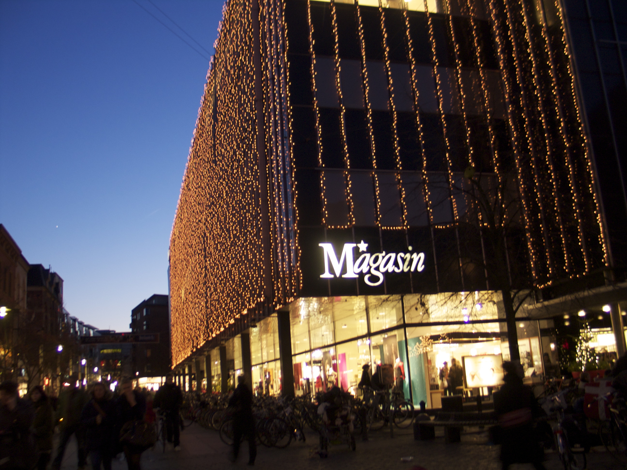 DA: Magasin du Nord i Aarhus ved juletid, 2008.